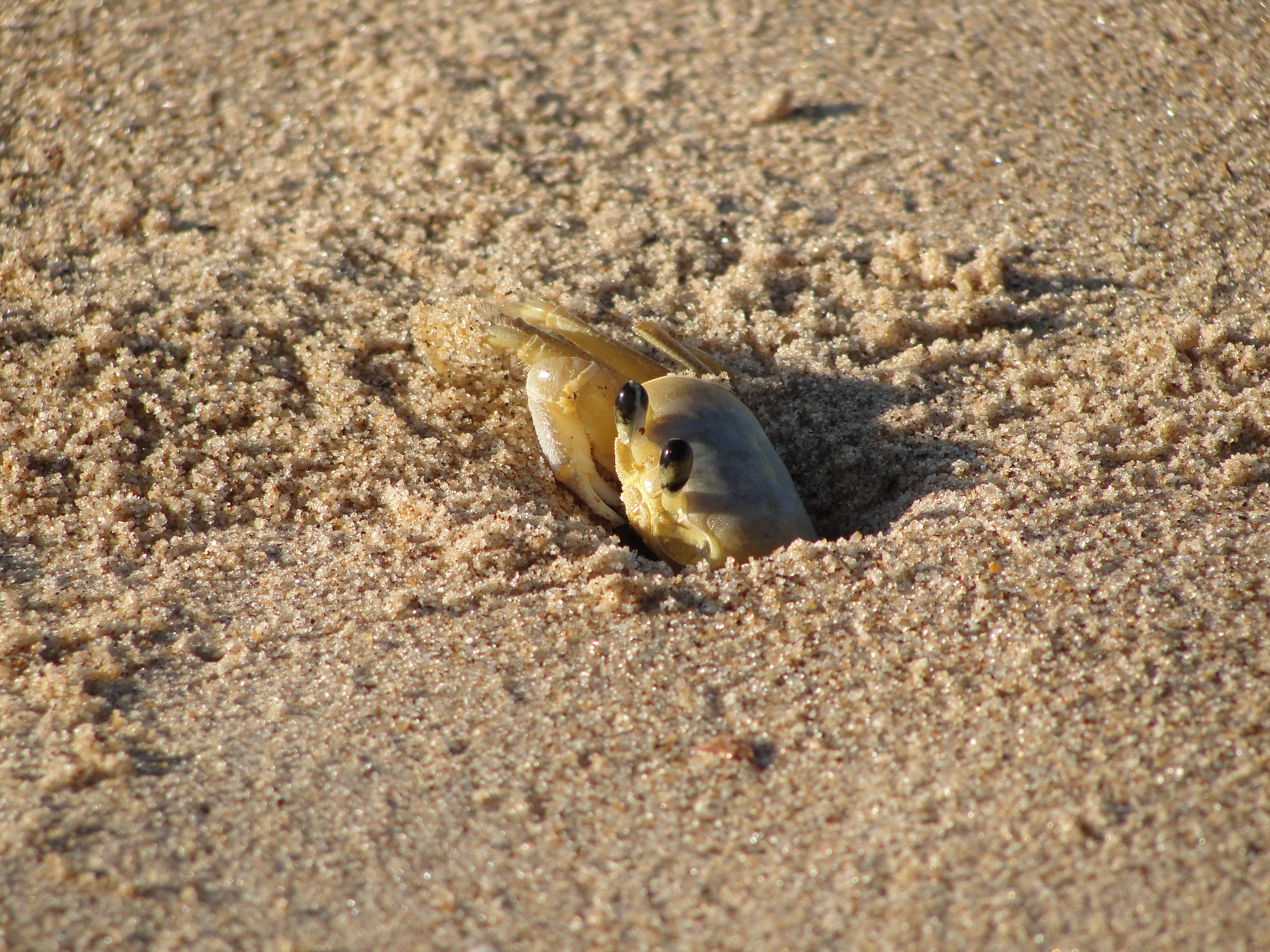 Guruçá saindo da toca logo ao amanhecer. Fotografia tirada na Praia de Camburi em Vitória/ES.